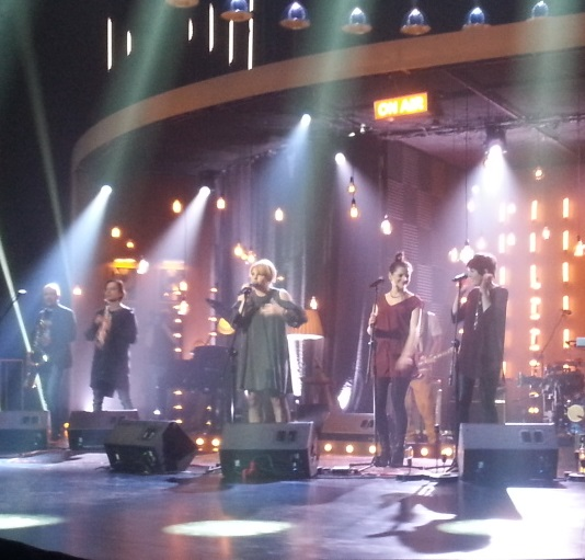 Polska piosenkarka Ania Dąbrowska.